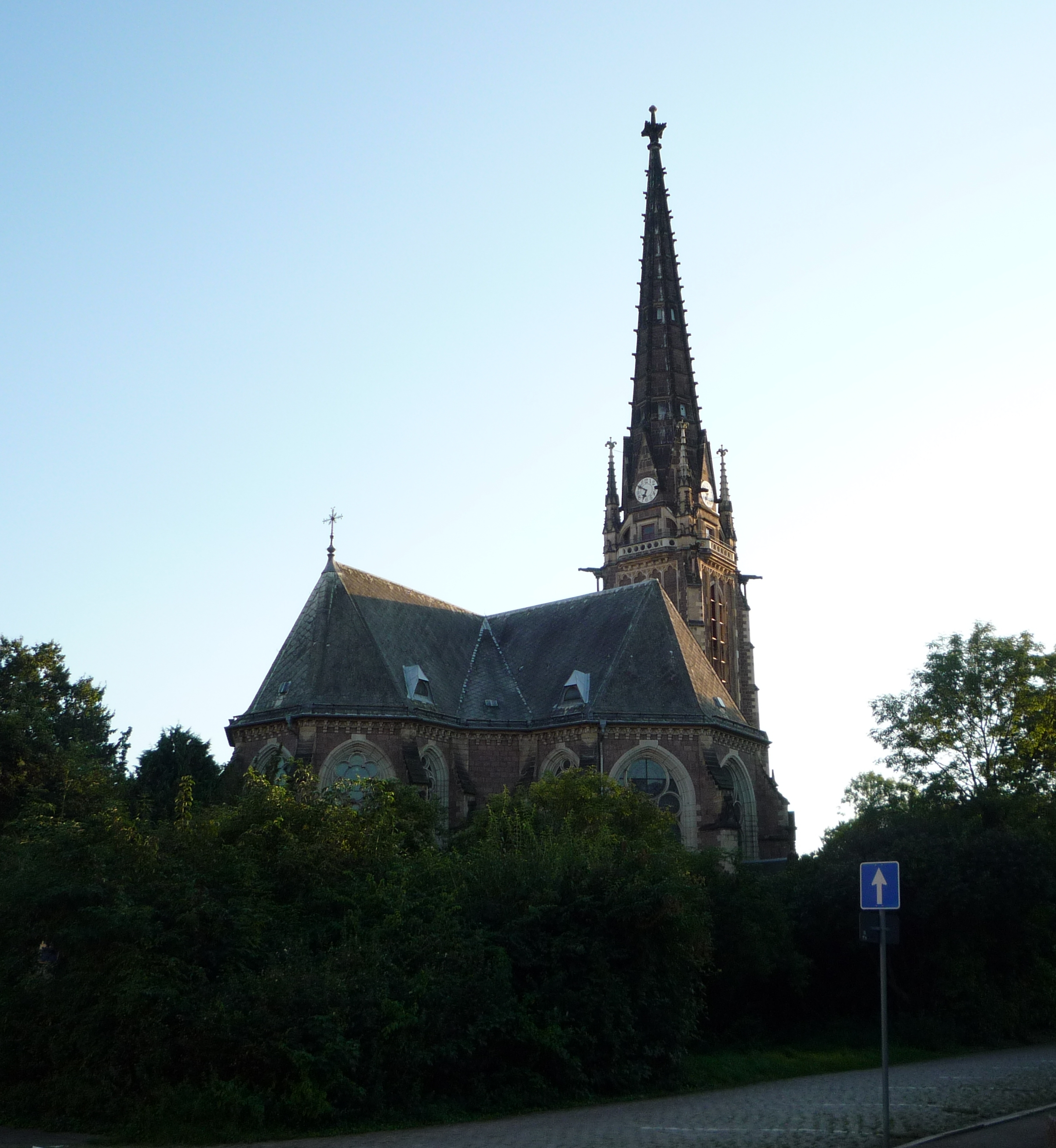 Die Johanneskirche im Meißener Stadtteil Cölln, gesehen von der nördlichen Ecke Loosestraße-Johannesplatz.